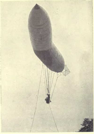 Acidente do N. 2